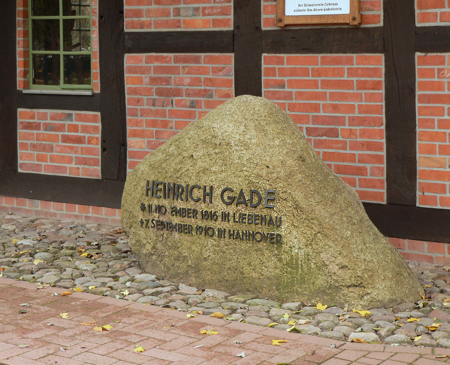 Stein für Heinrich Gade in Liebenau am Witten Hus